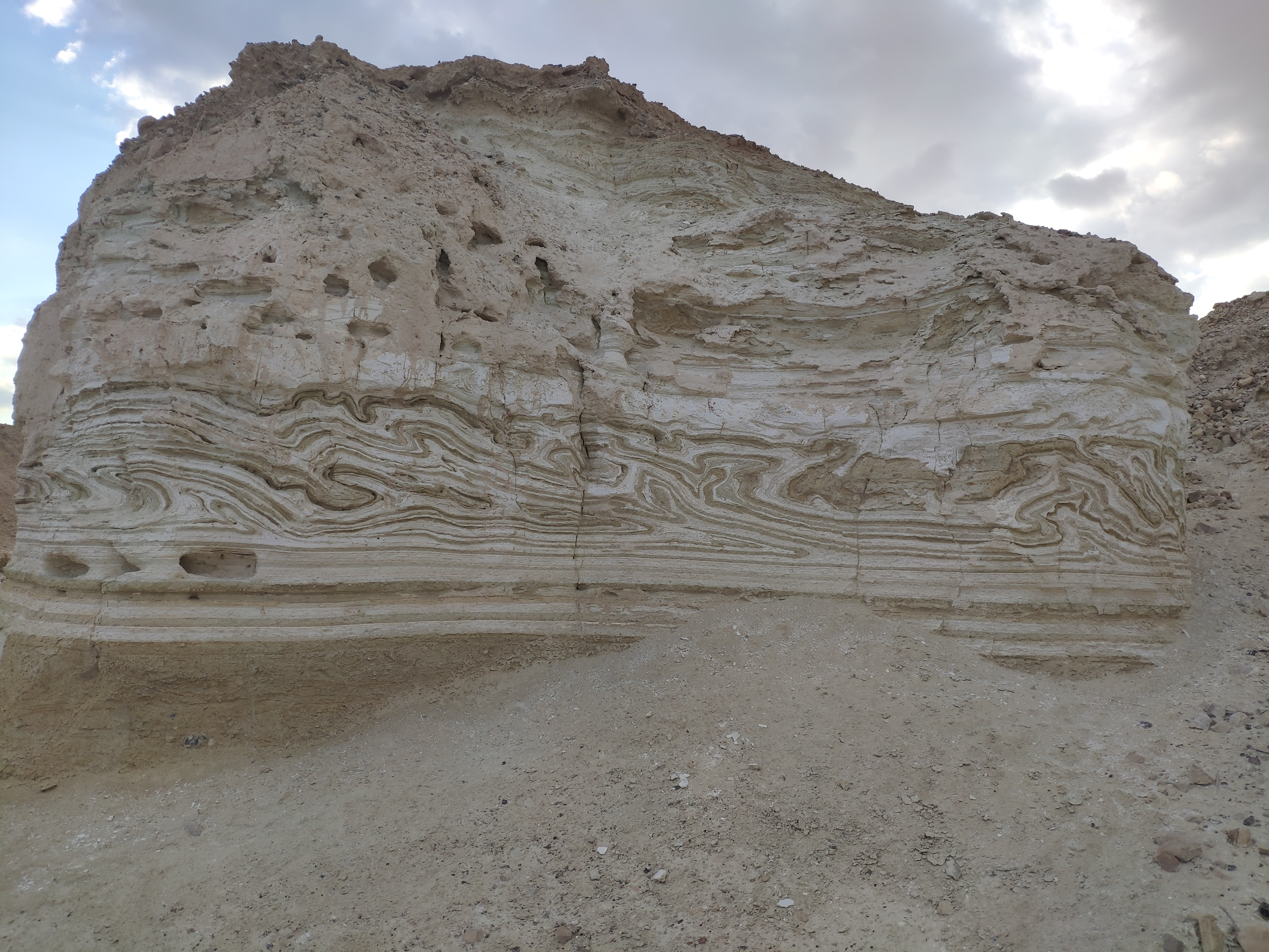 קמטים בסלעי תצורת הלשון בנחל פרצים